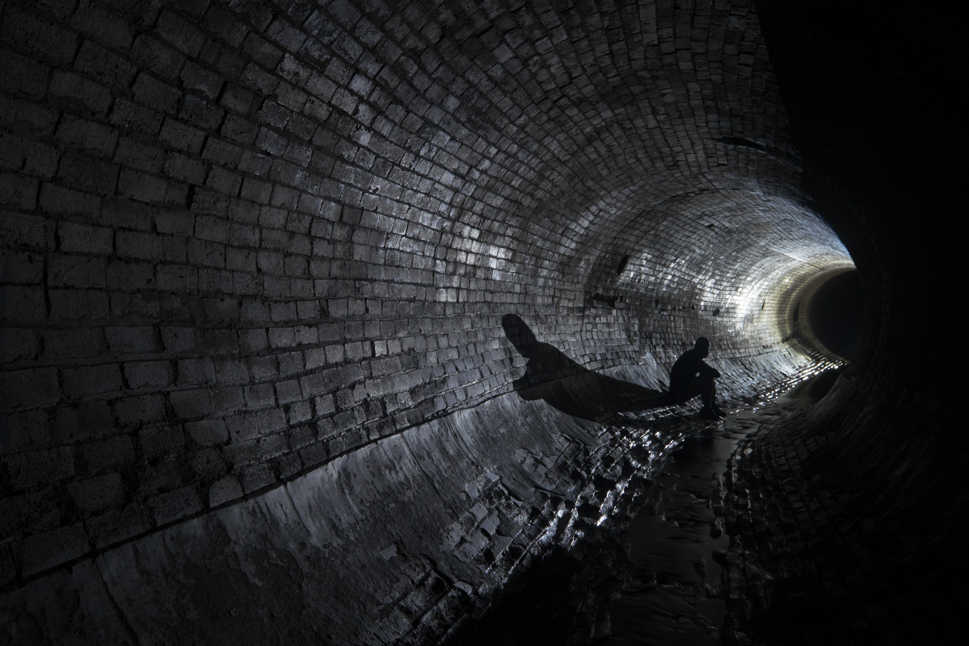 Un drain en briques à Brisbane